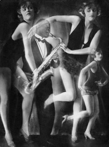 Charleston. 1926-1927. Vintage, Silbergelatineabzug, Mehrfachbelichtung. 22,7 x 16,9 cm